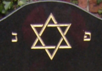 Symbol Gwiazdy Dawida na nagrobku Maksymiliana Metzendorfa na cmentarzu żydowskim w Bielsku-Białej